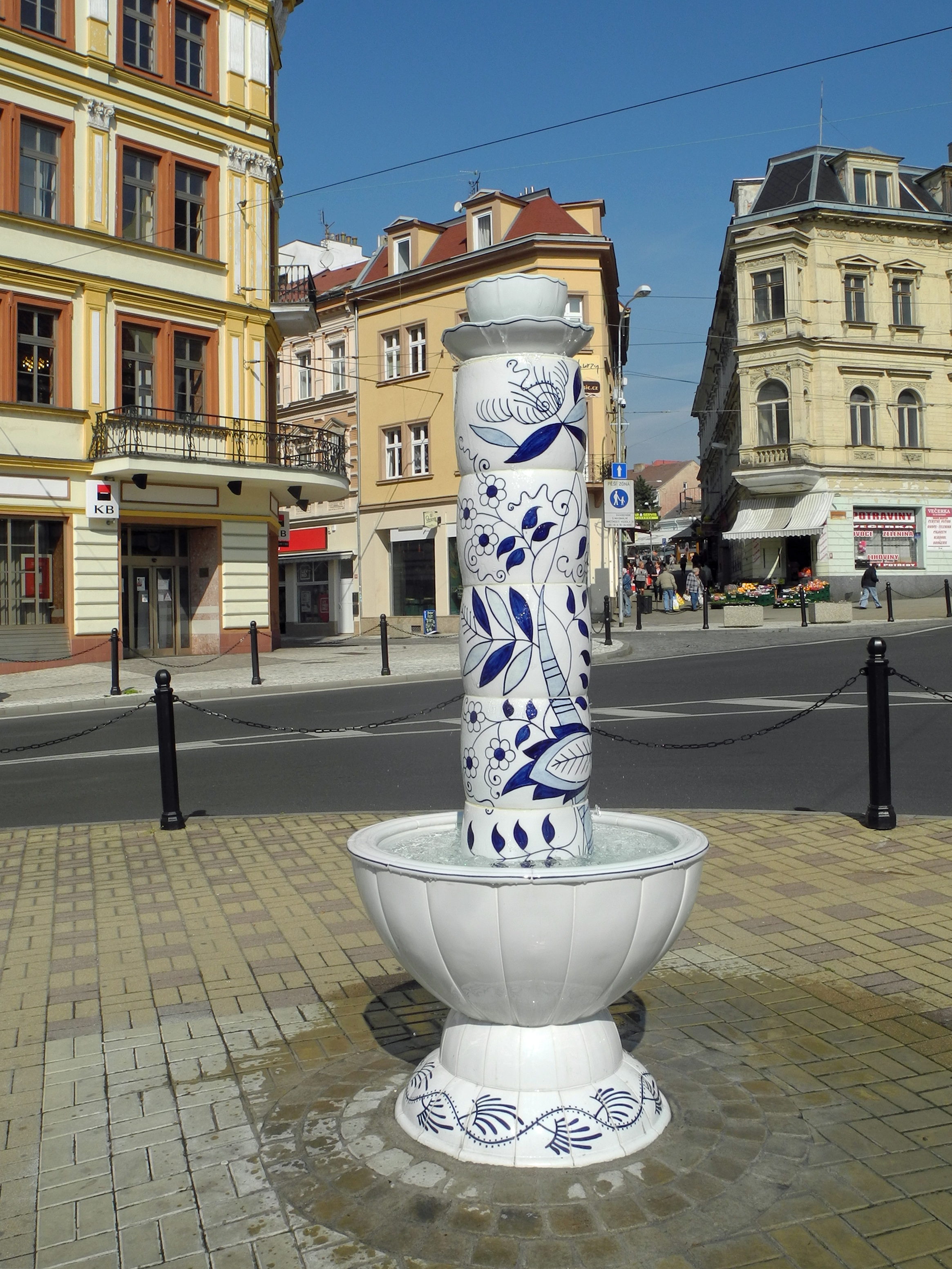 Der neue Porzellanbrunnen in Teplitz am ehem. Graupner Tor - Teplice, U Divadla, hergestellt von der firma Český porcelán Dubí (Eichwald), eingeweiht am 8. August 2018, entworfen vom Bildhauer Jiří Kožíšek (* 1955), siehe [1] und [2].